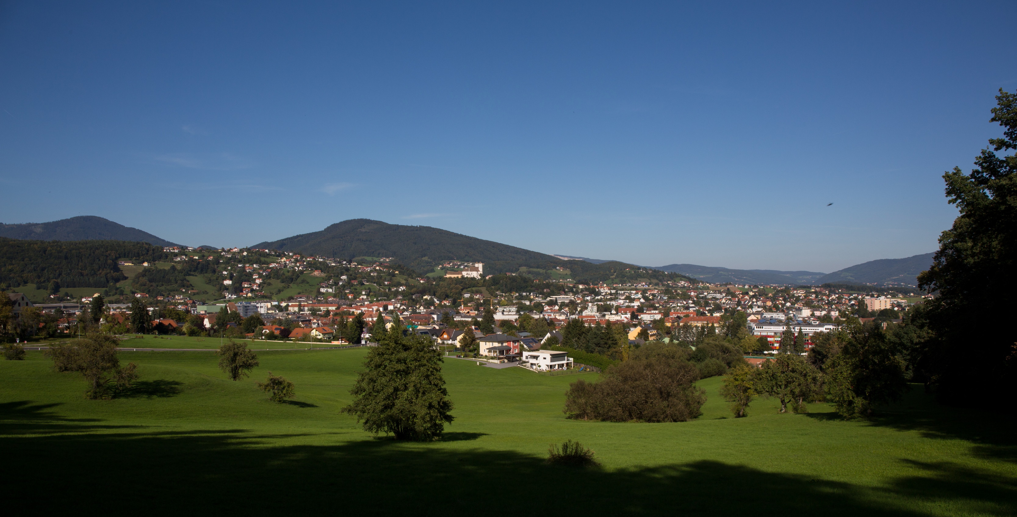 Weiz, Austria